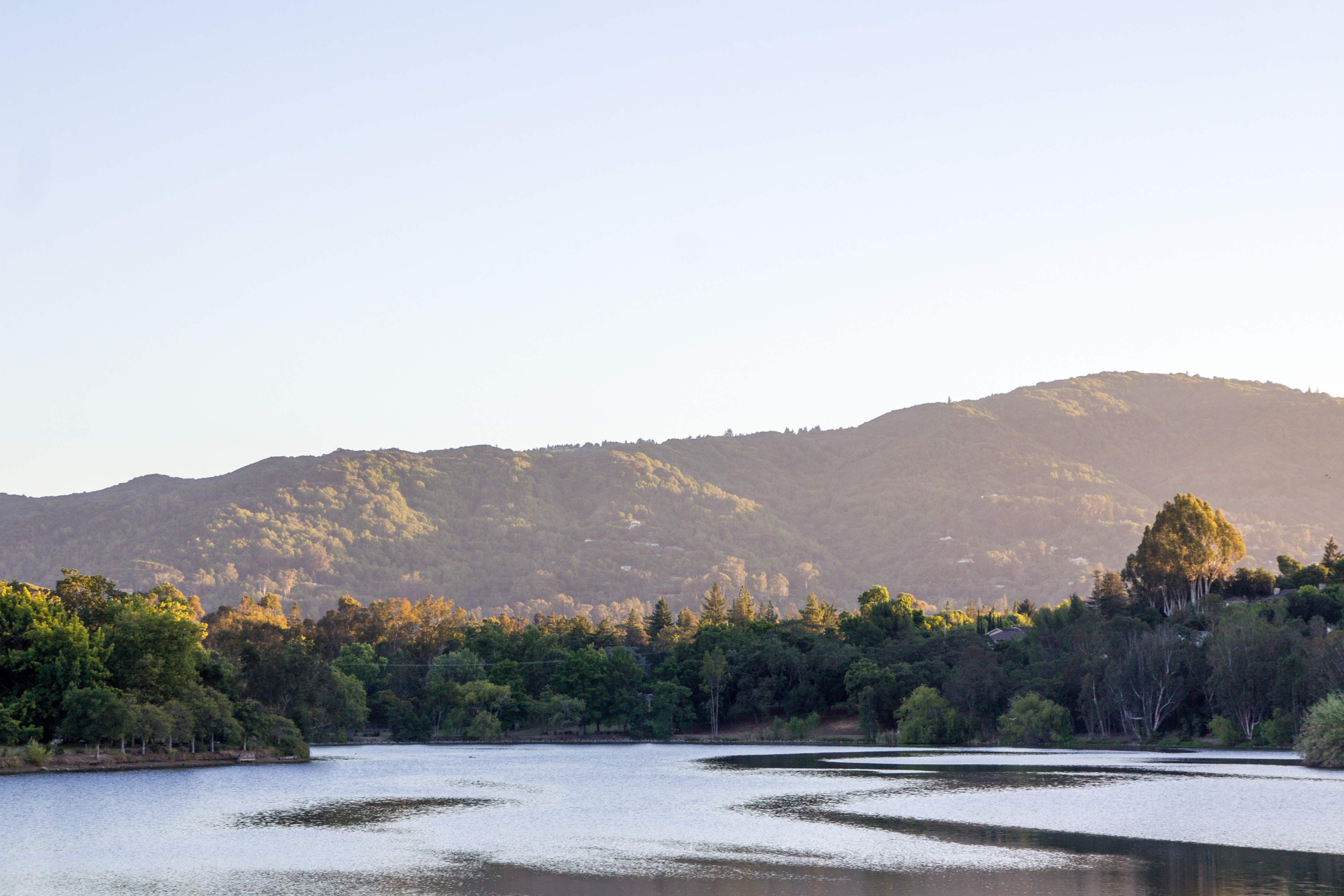 Vasona Reservoir, Los Gatos